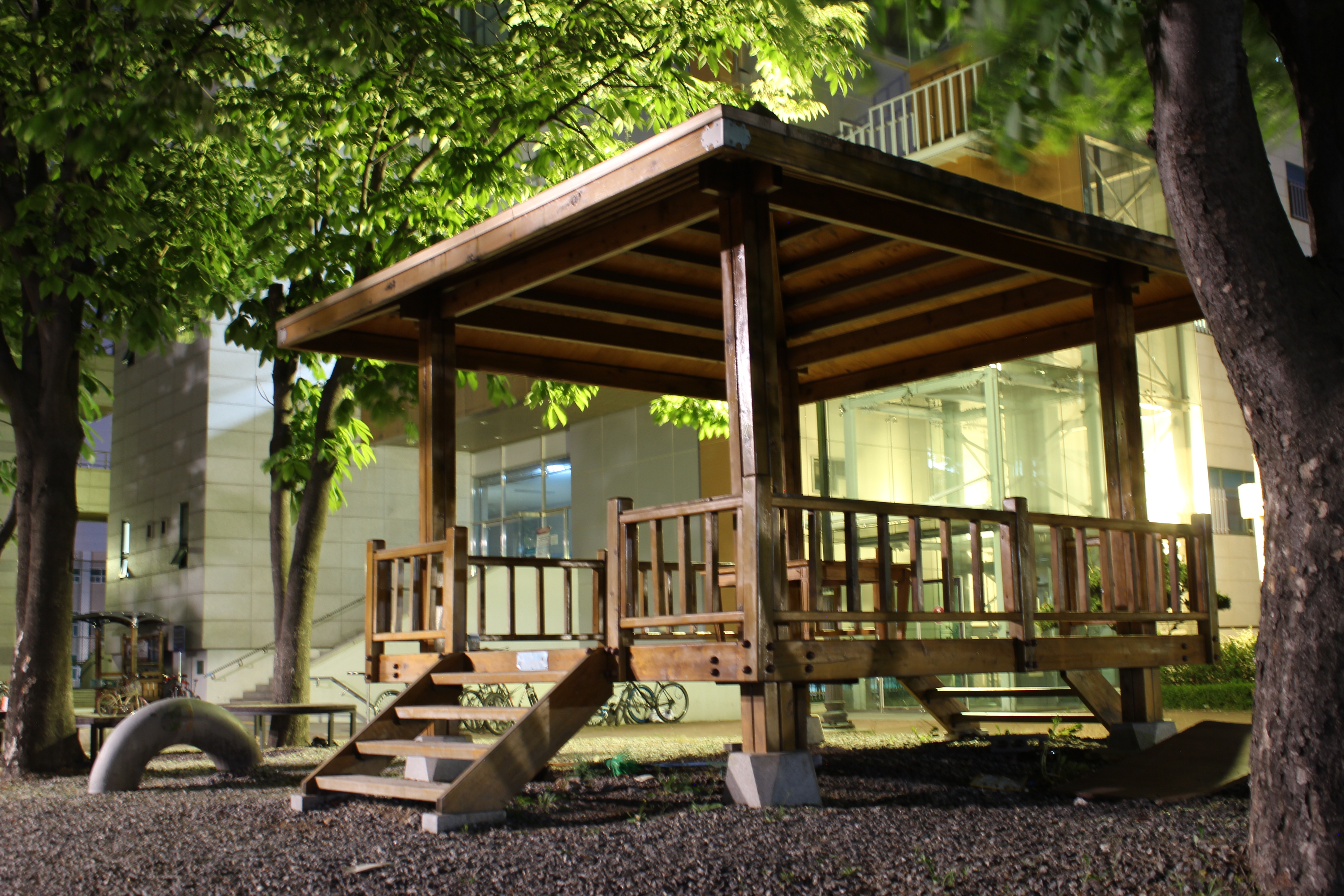 한국체육대학교 내에 존재하는 정자의 야경.